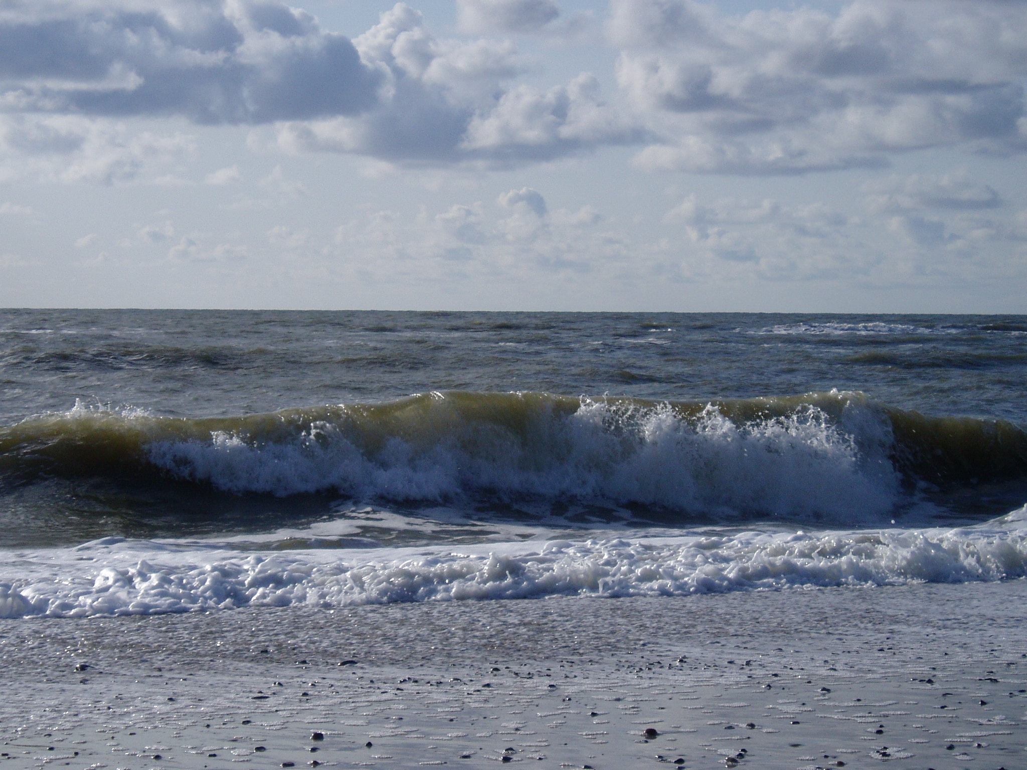 Nordsee, Dänemark, Wellen